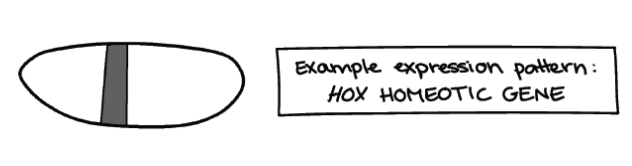 hoc